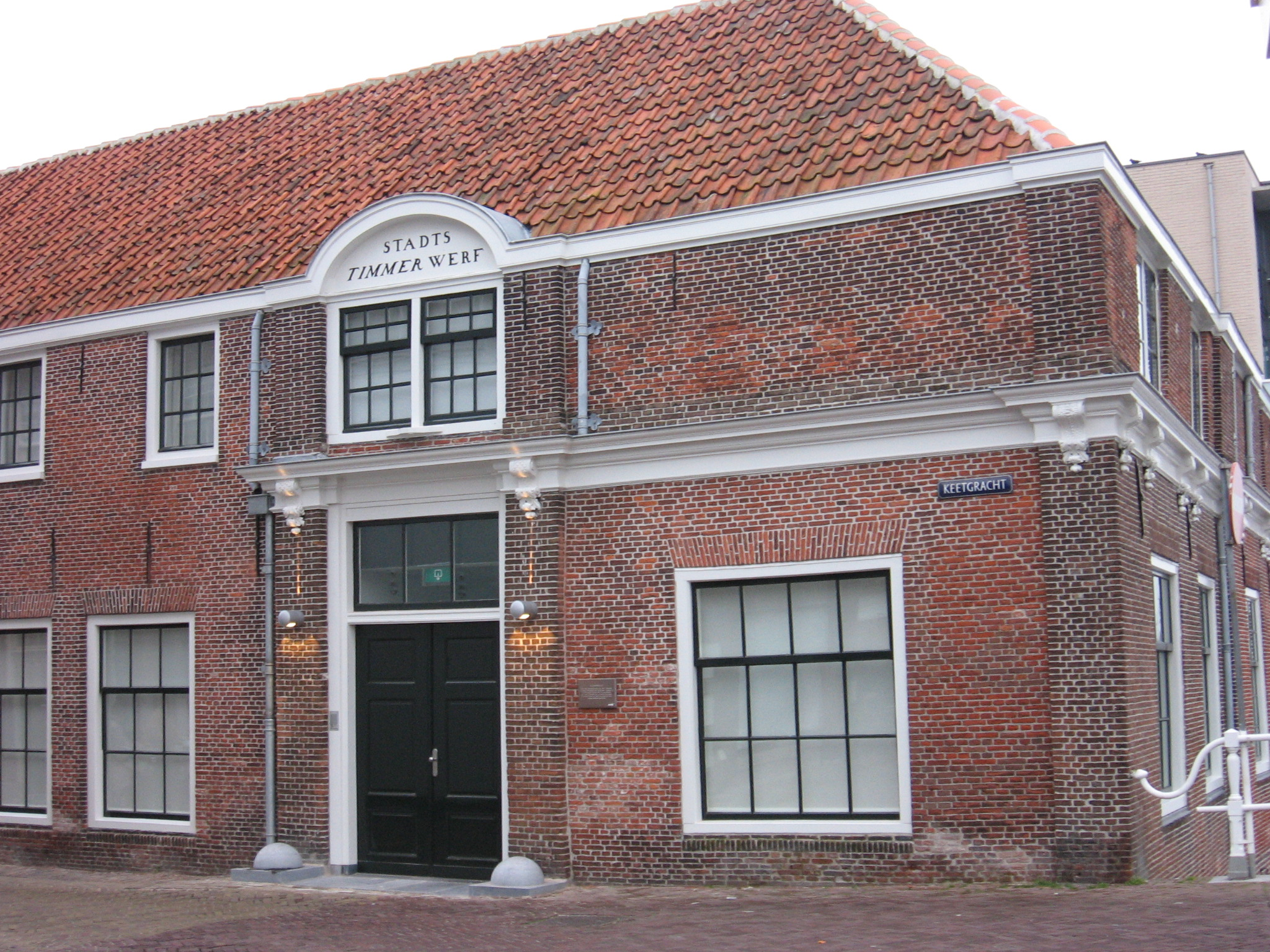 Alkmaar, stadstimmerwerf, dec 2006